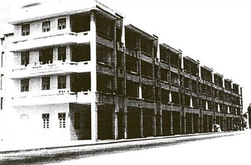 中文（香港）: 1950年代香港太子道西的戰前唐樓群。